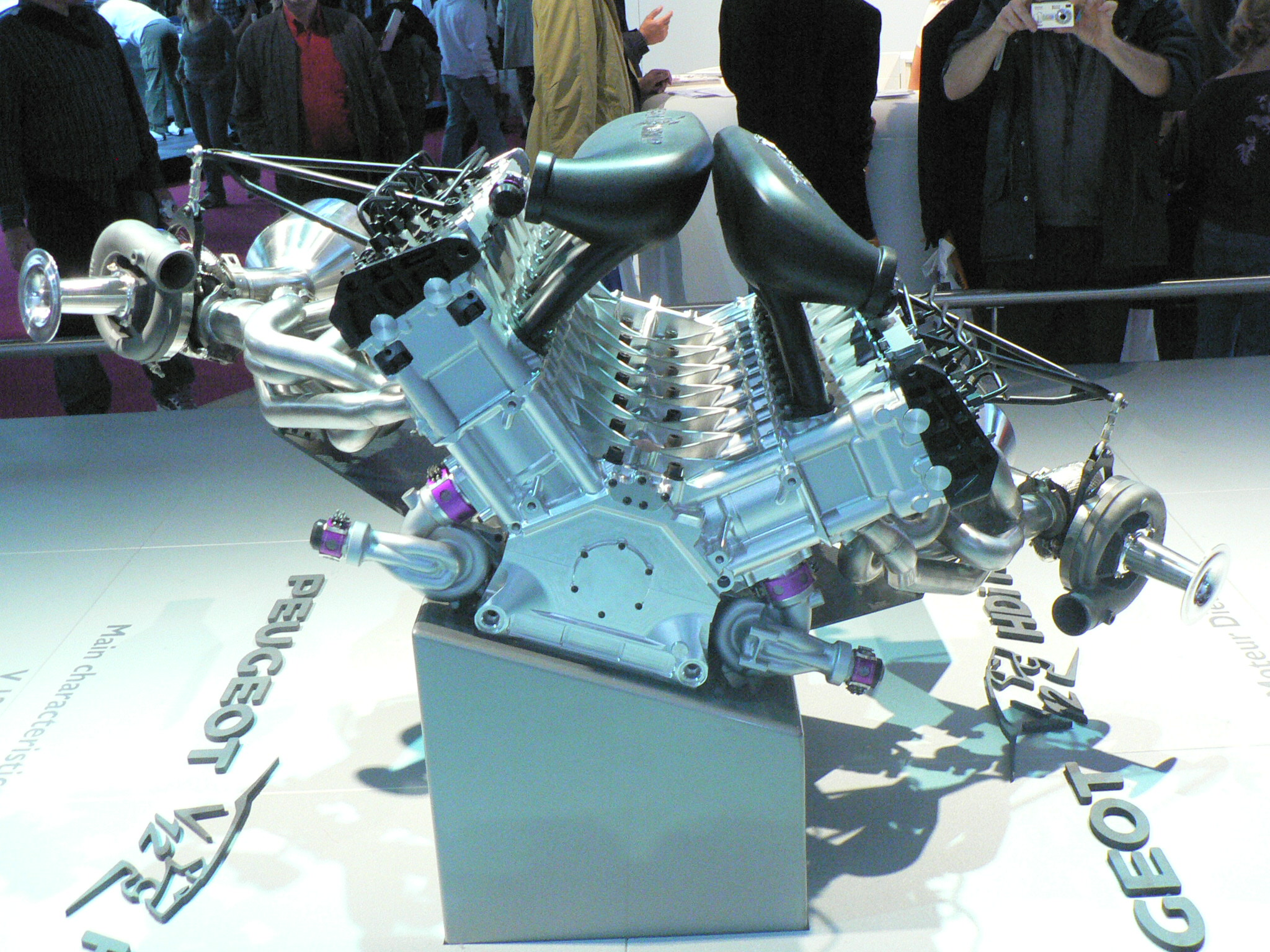 Mondial de l'automobile, Paris 2006